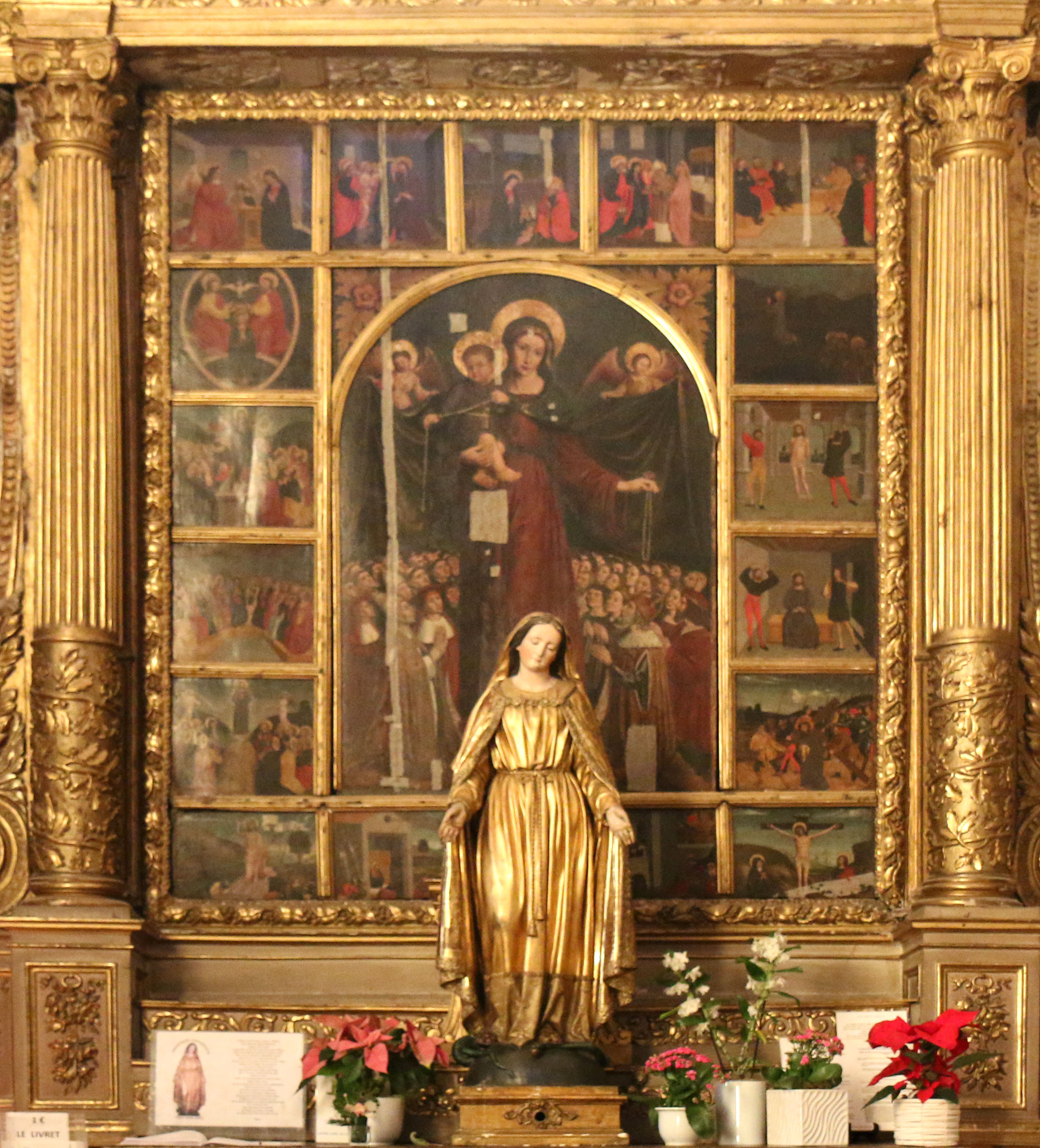 Retable attribué à Louis Brea vers 1515. Ce retable se compose de 19 tableaux: au centre, la tableau principal, représente la vierge de la miséricorde protégeant sous son manteau l'humanité toute entière autour 15 petits tableaux représentant les mystères du rosaire dont : - à gauche les 5 mystères glorieux - en haut les 5 mystères joyeux -à droite les 5 mystères douloureux sous le tableau principal se trouvent trois petits tableaux représentant des scènes de la vie quotidienne.